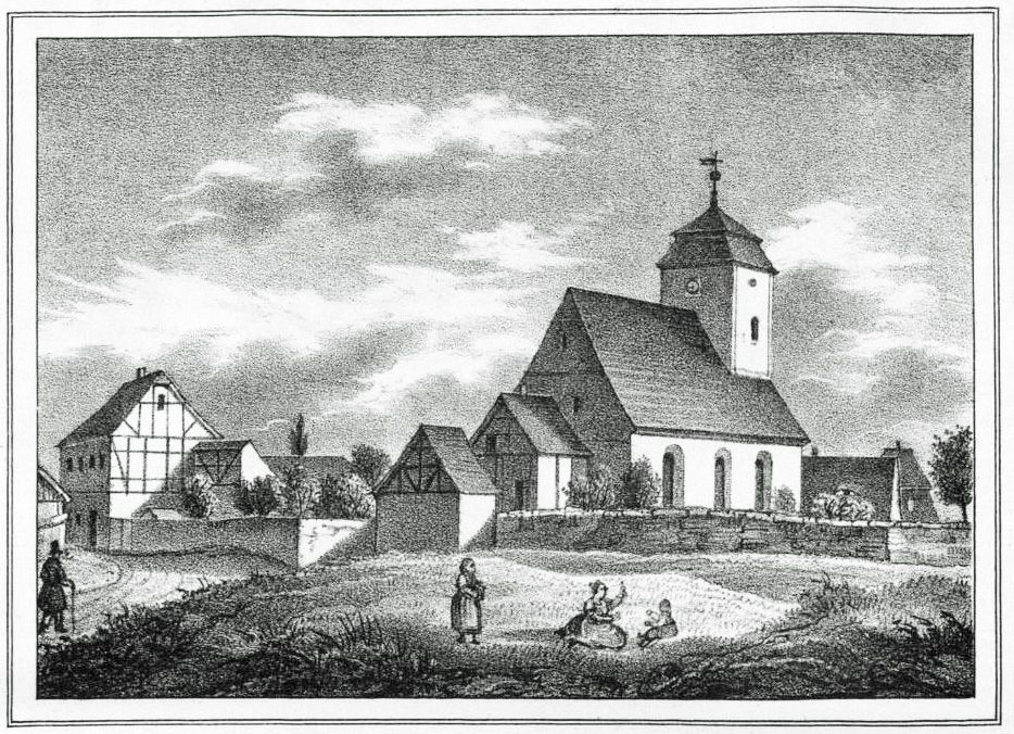 Dorfkirche von Portitz, um 1850